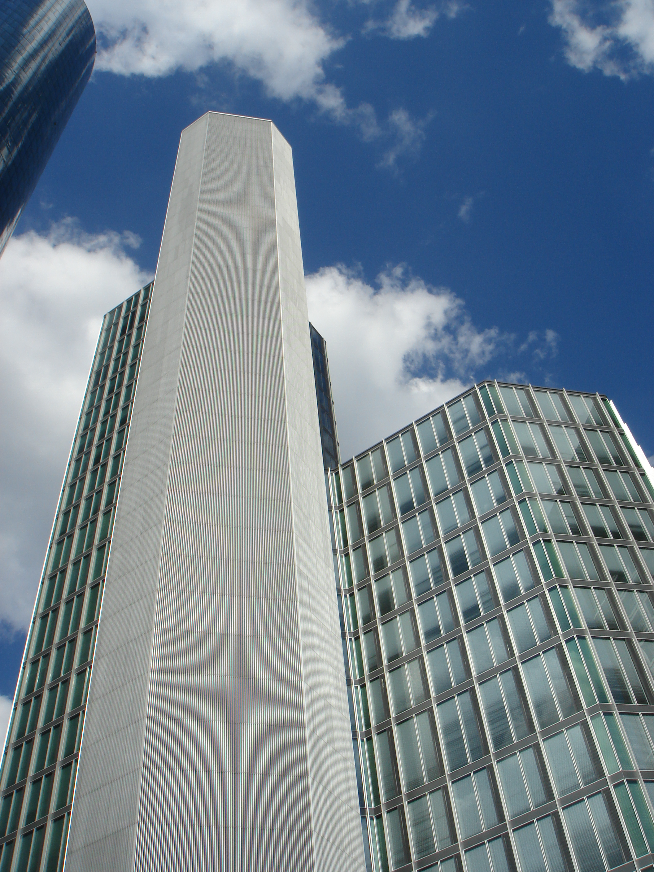 Garden Towers Frankfurt